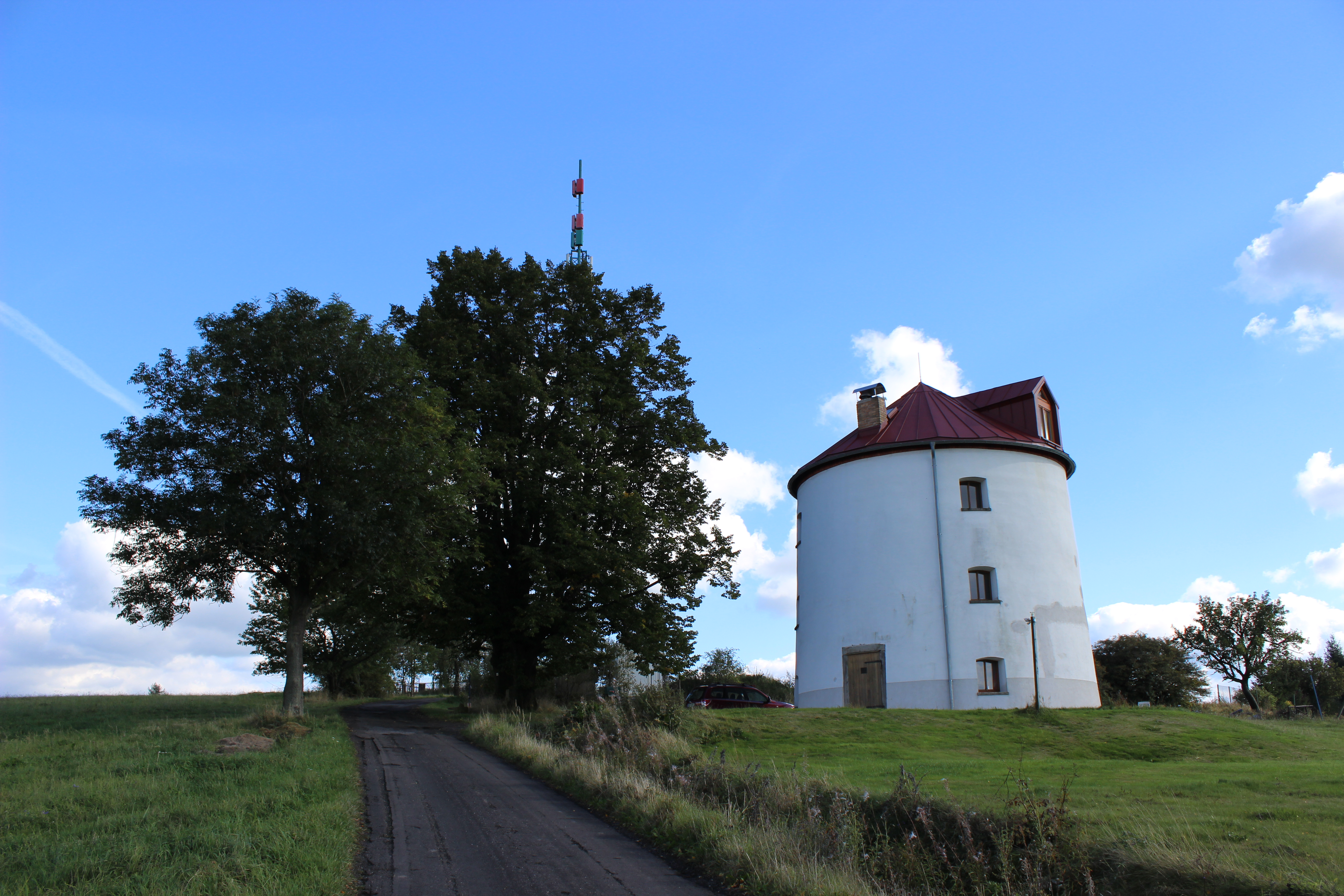 Bývalý větrný mlýn (dům číslo popisné 7) na Františkově Vrchu.